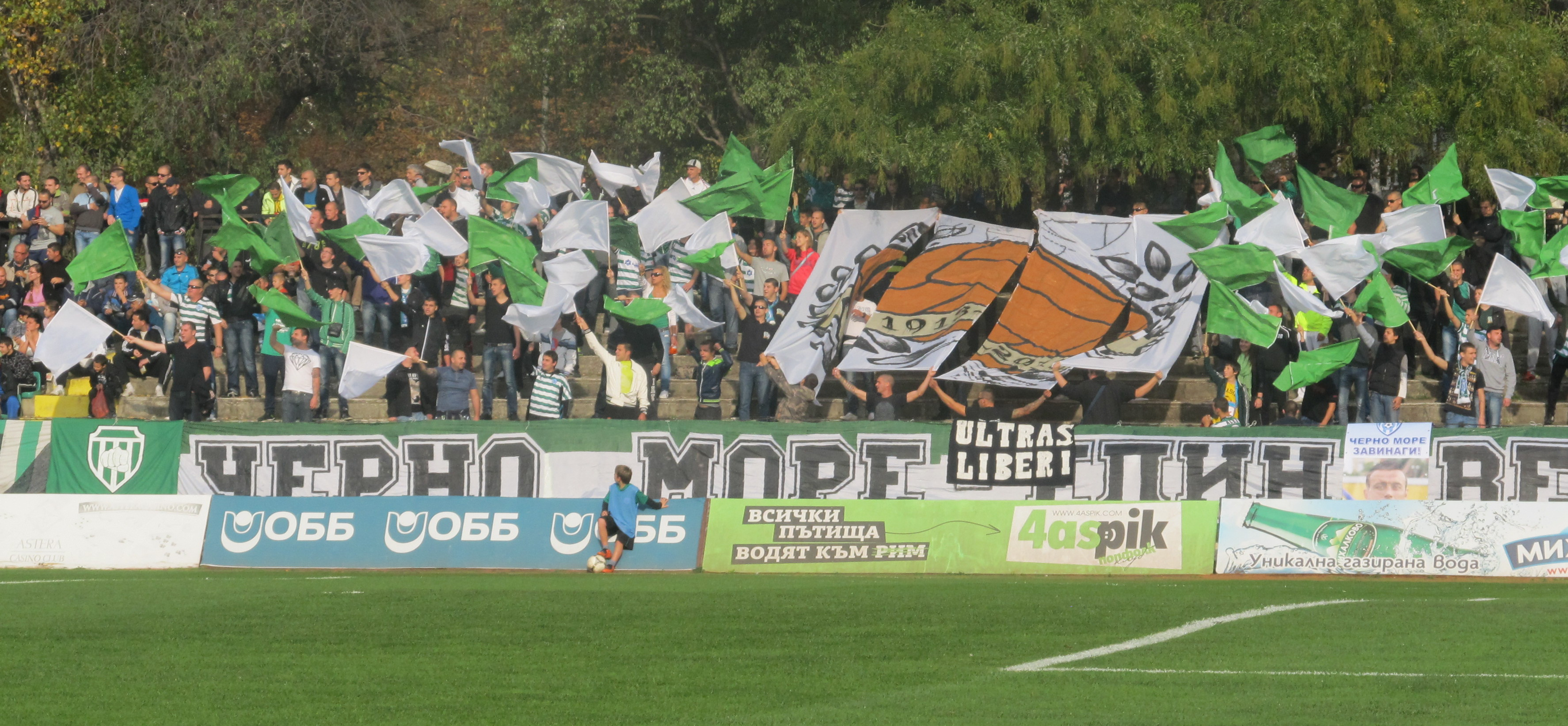 Феновете на Черно море по време на двубоя с ЦСКА (03.11.2013)